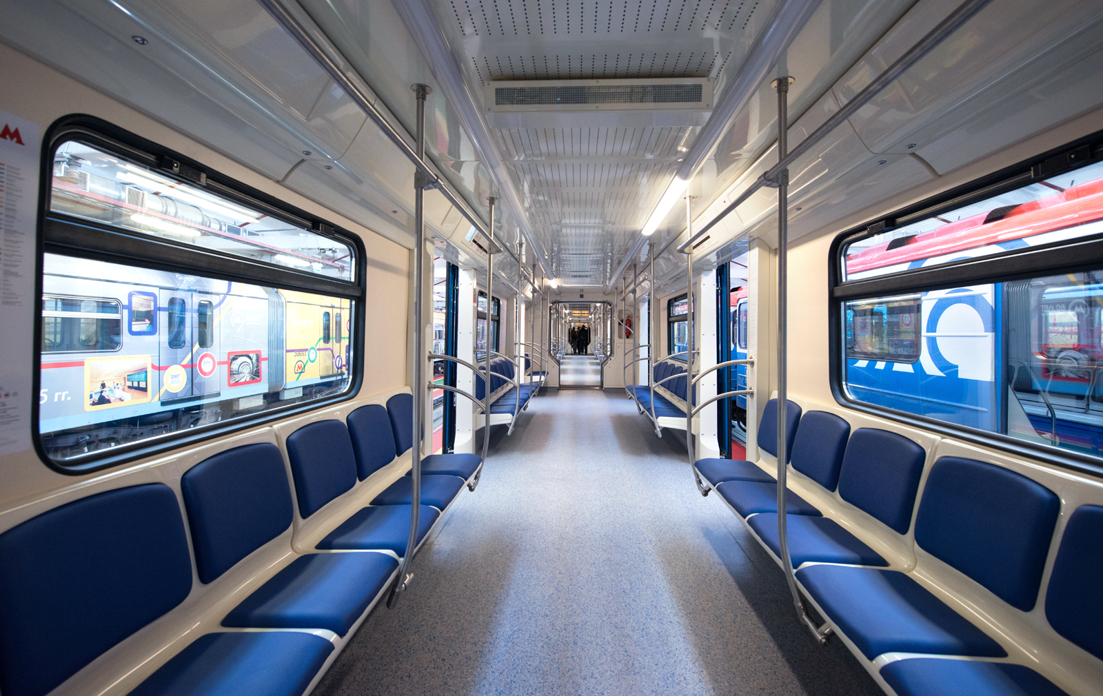 Салон электропоезда 81-760А/761/763А